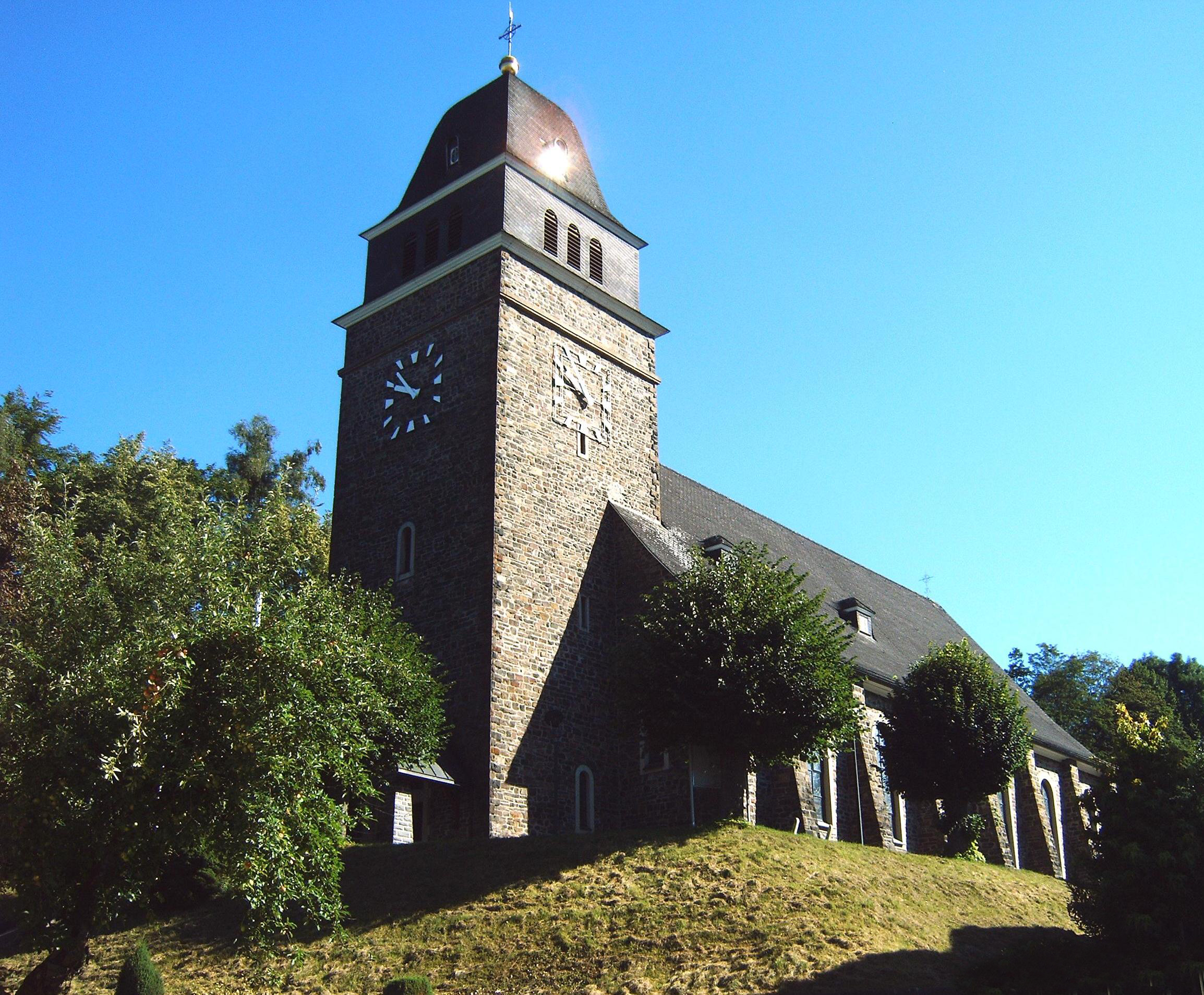 2007, kath. Pfarrkirche